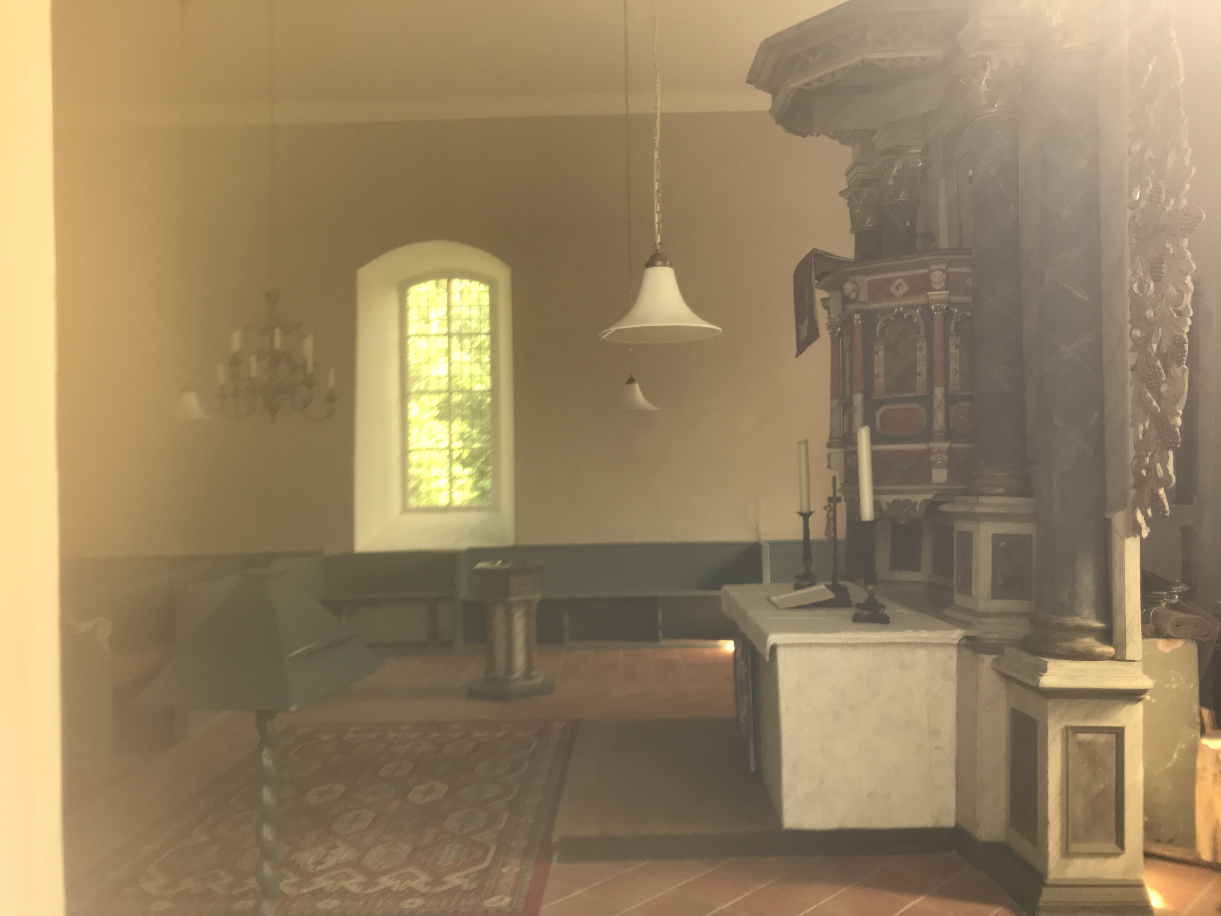 Die Dorfkirche Merz der Gemeinde Ragow-Merz im Landkreis Oder-Spree ist eine spätgotische Feldsteinkirche. Im Innern steht unter anderem ein spätbarocker Kanzelaltar mit einem Korb aus der ersten Hälfte des 17. Jahrhunderts.